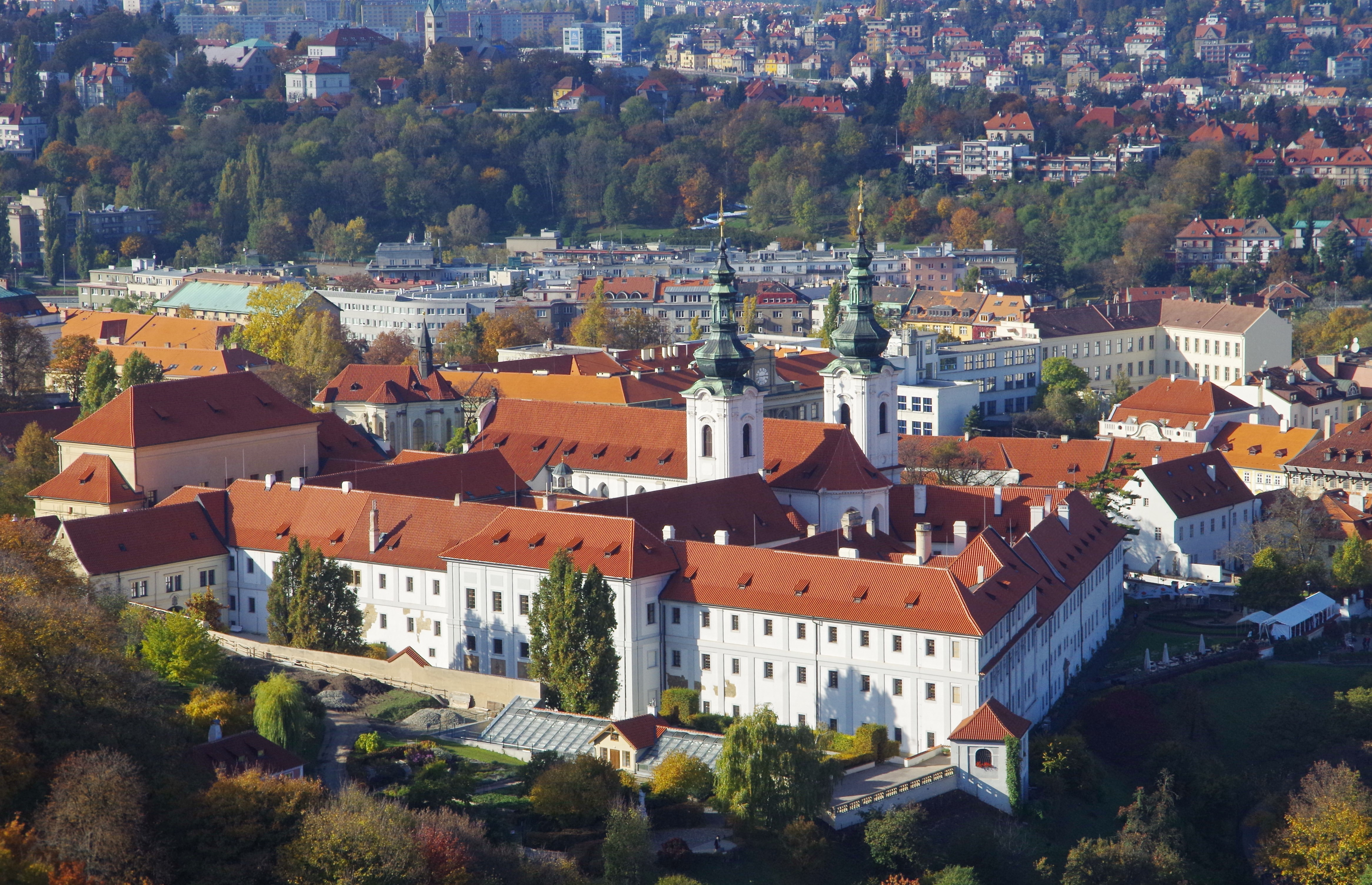 Kloster Strahov vom Aussichtsturm Petrin